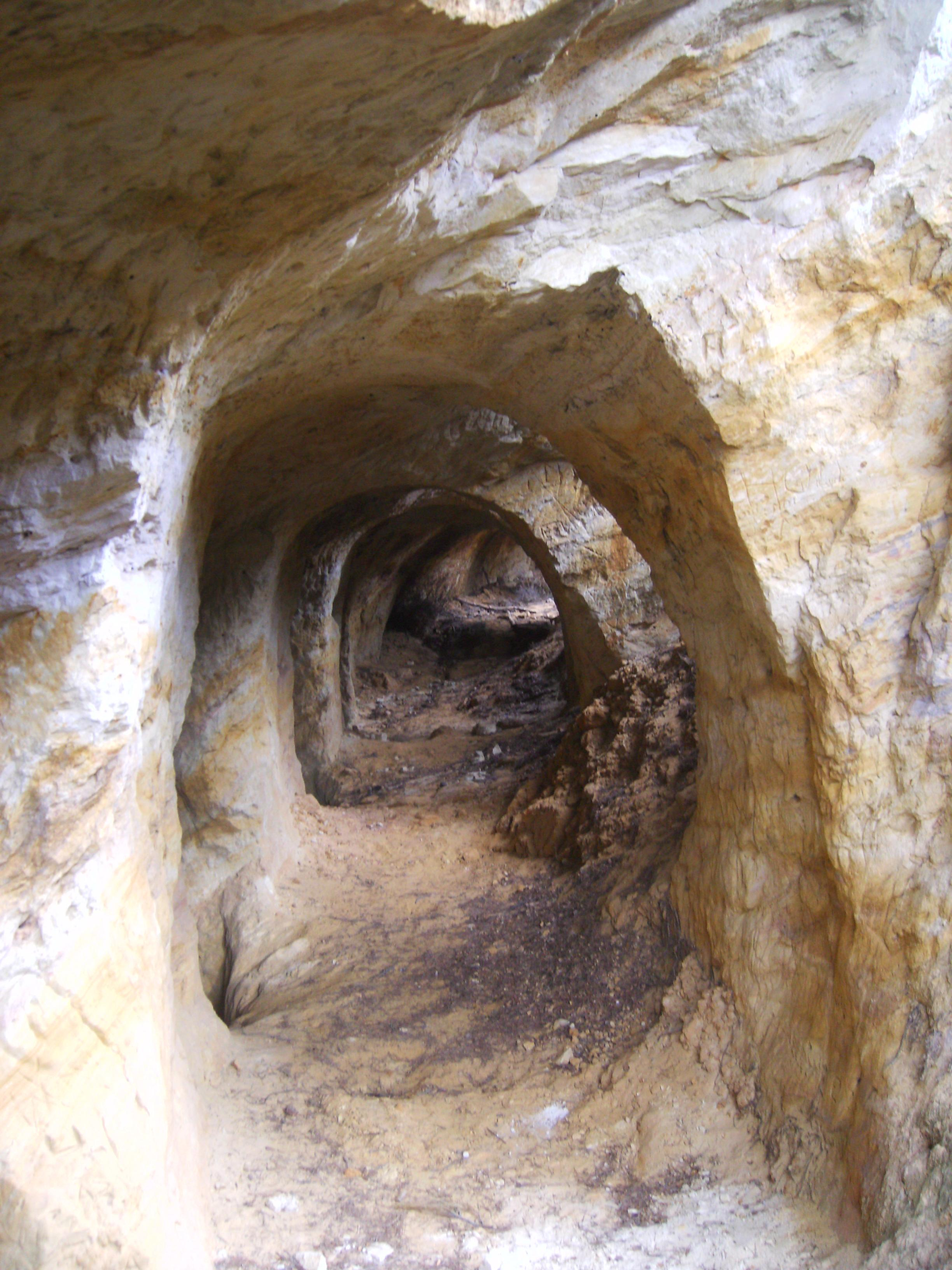 Photo de l'entrée des anciennes mines de sable de Martigues vers le quartier de Boudème le long de l'ancienne route vers Saint-Julien.